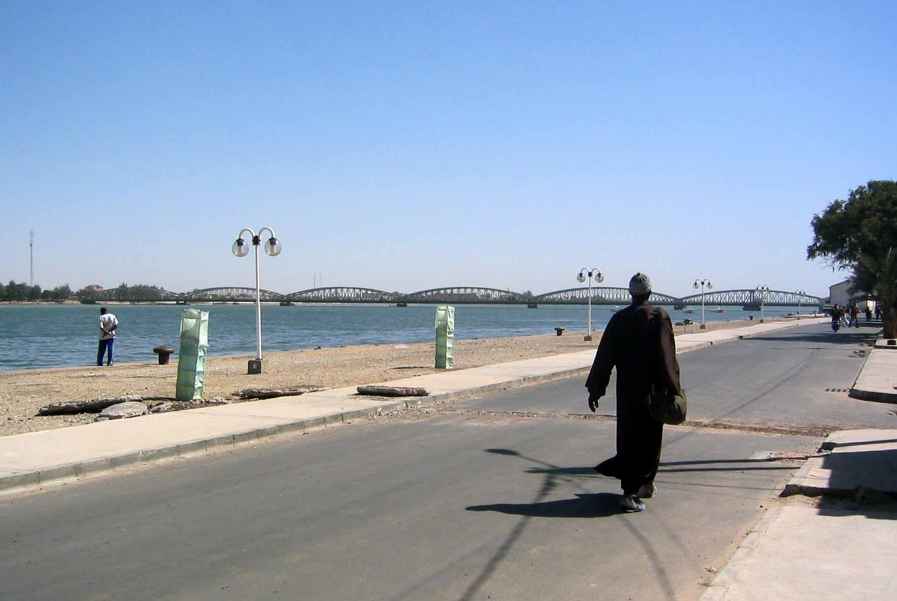 Pont Faidherbe à Saint-Louis du Sénégal